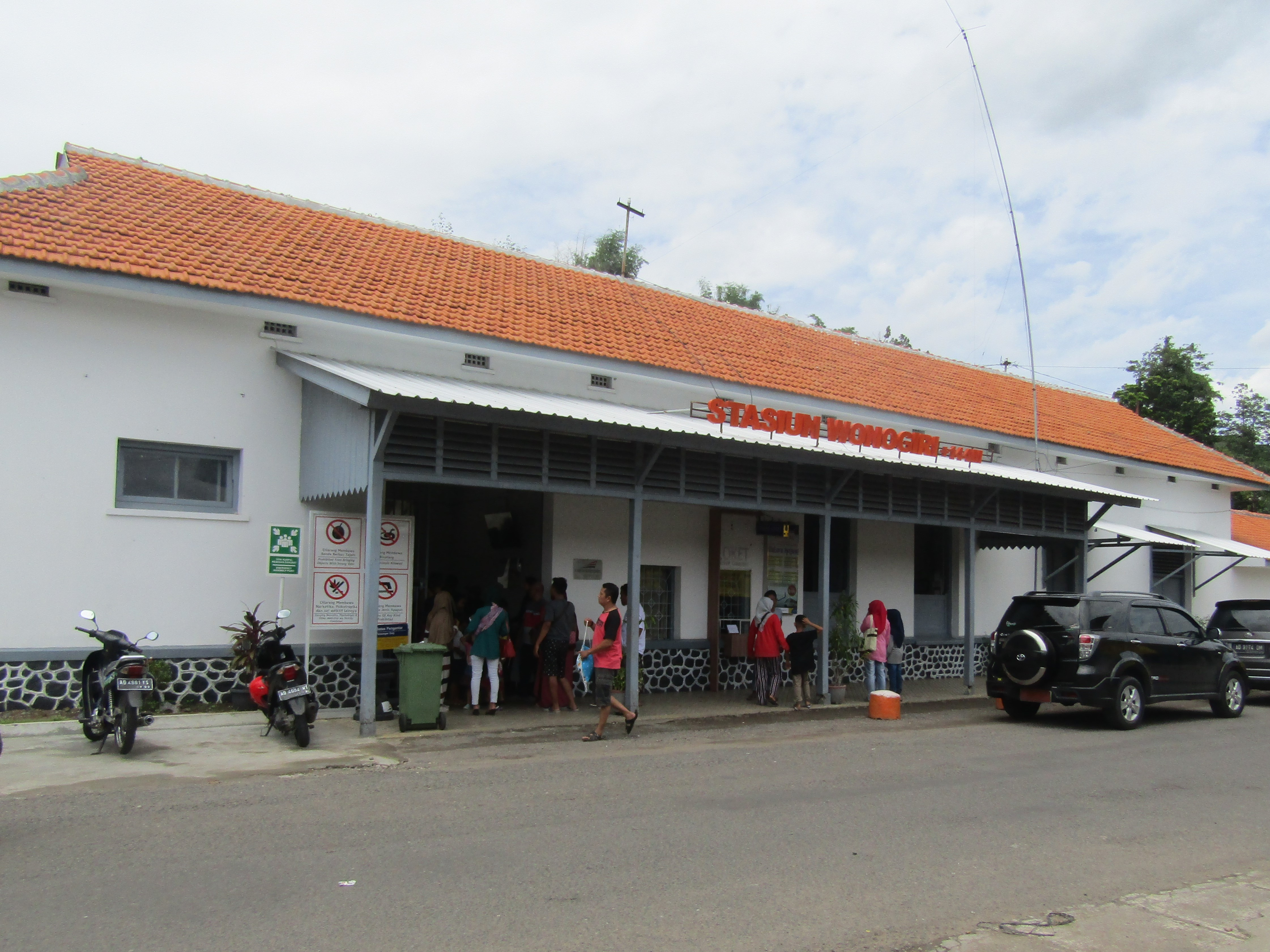 Stasiun Wonogiri, tampak depan, tahun 2020